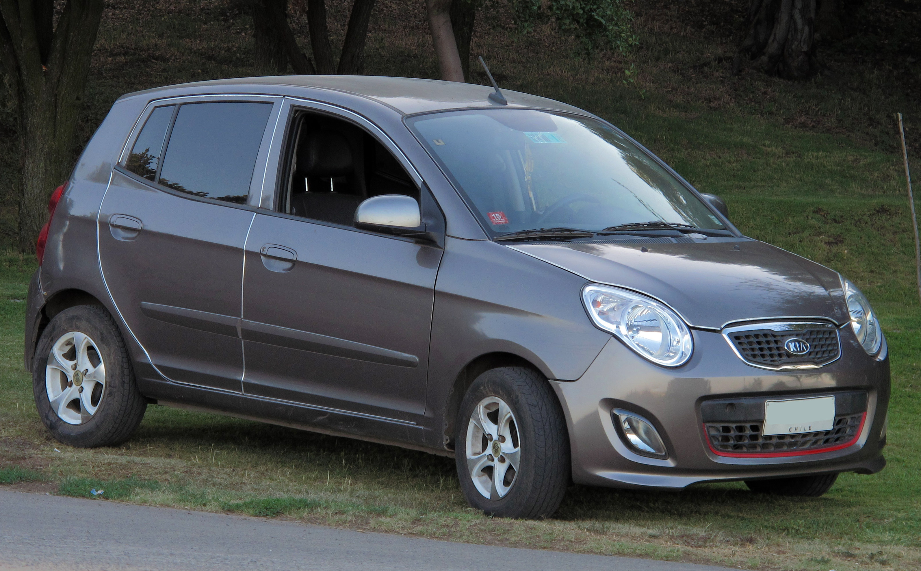 Kia Morning 1.1 EX 2011